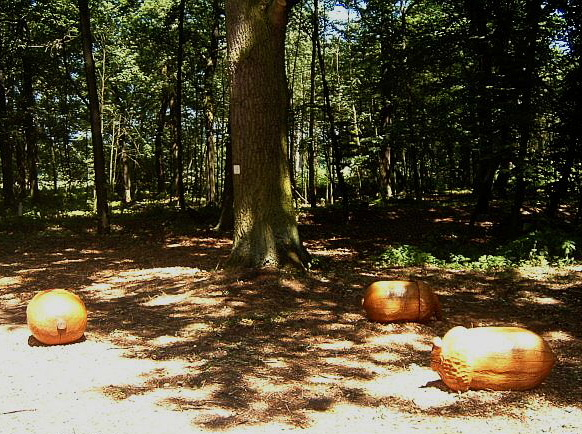 Skulpturen nach Entwürfen von F. K. Waechter, zu sehen im Frankfurter Stadtwald entlang des Grüngürtels